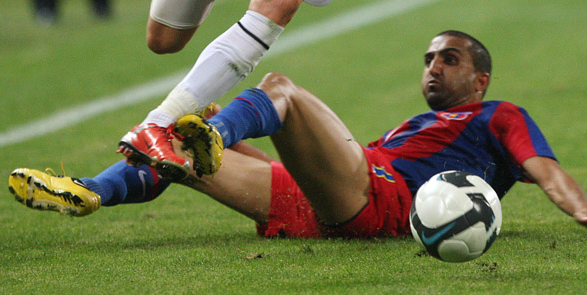 FC Steaua Bukarest - Újpest FC (Euro Liga 2009-2010)